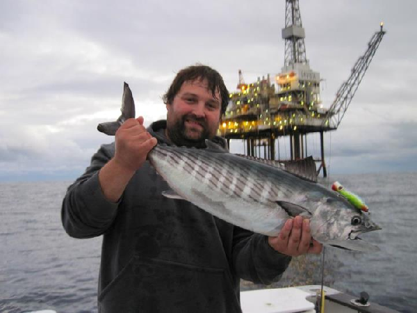 Sarda sarda collected near Bermeo, Spain